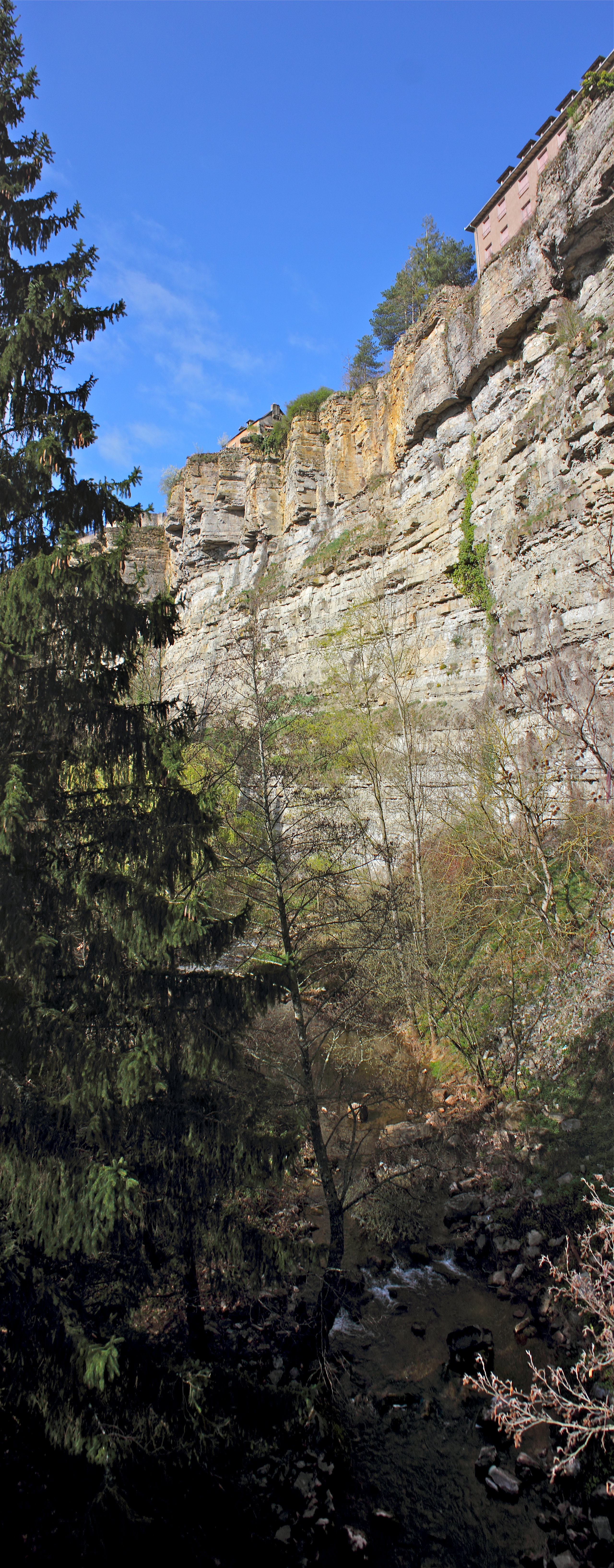 Le dourdou jouxte la roche du trou qu'il a creusé.